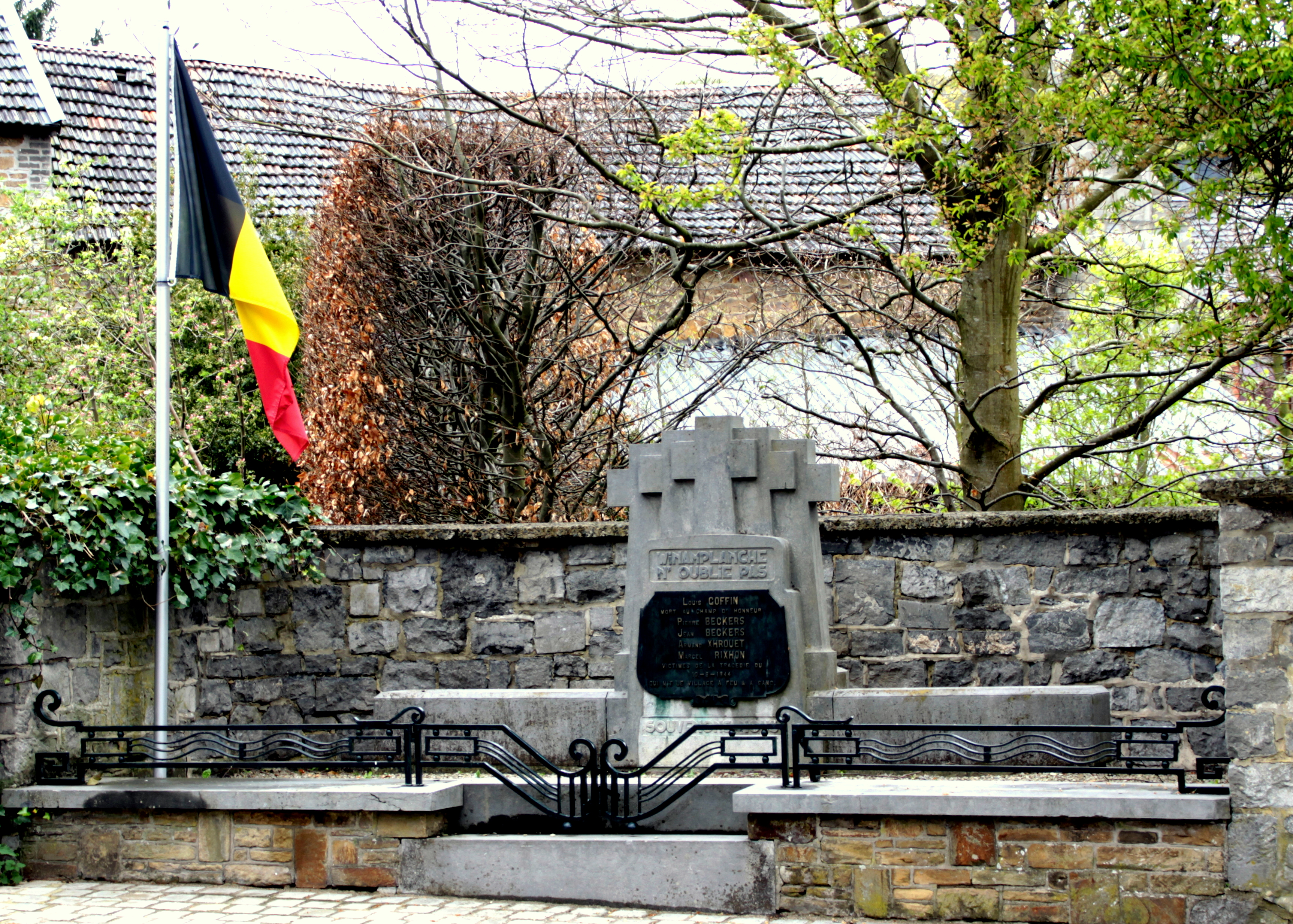 De Monument aux morts bei der Kierch